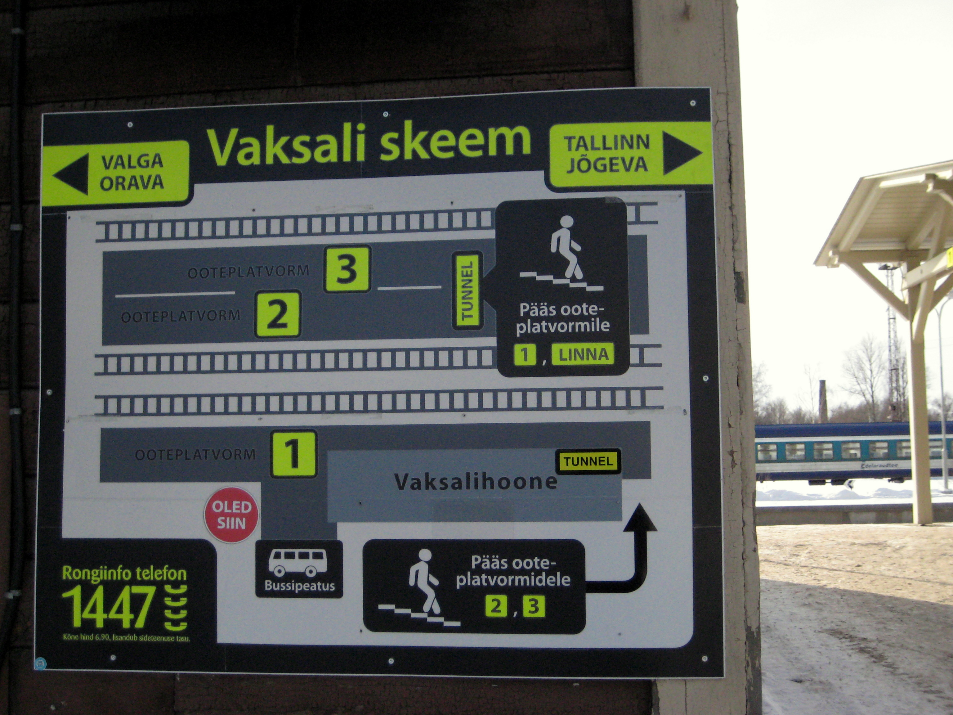 Tartu raudteejaama plaan